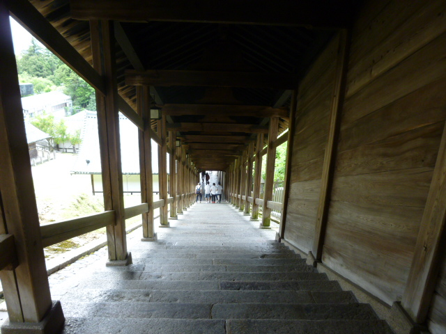 二月堂登廊